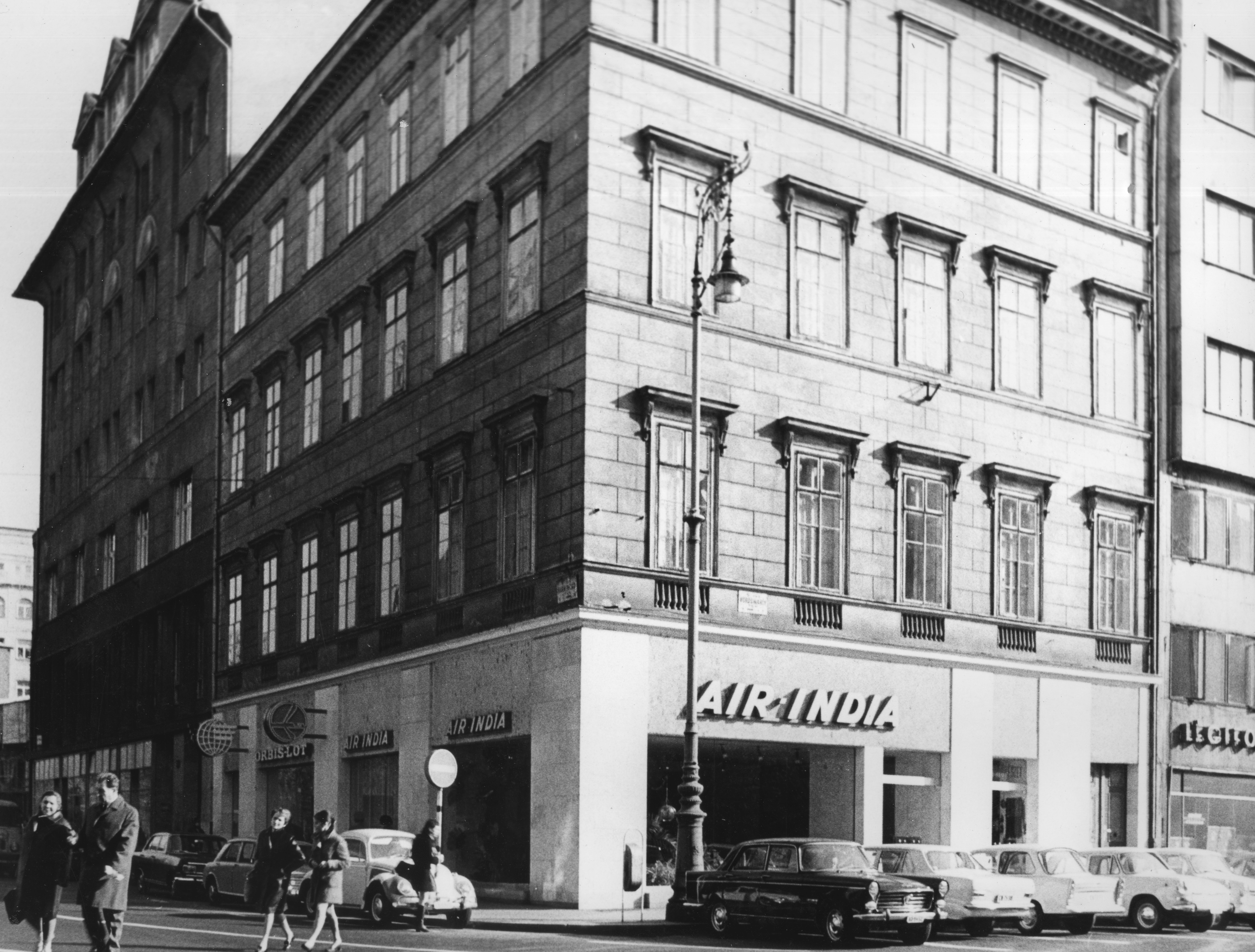 Vörösmarty tér - Harmincad utca sarok, az Air-India légitársaság képviselete. Location: Hungary, Budapest V. Tags: Peugeot-brand, Opel-brand, Volkswagen-brand, flying, Volkswagen Beetle, French brand, automobile, street view, Budapest Title: Vörösmarty tér - Harmincad utca sarok, az Air-India légitársaság képviselete.